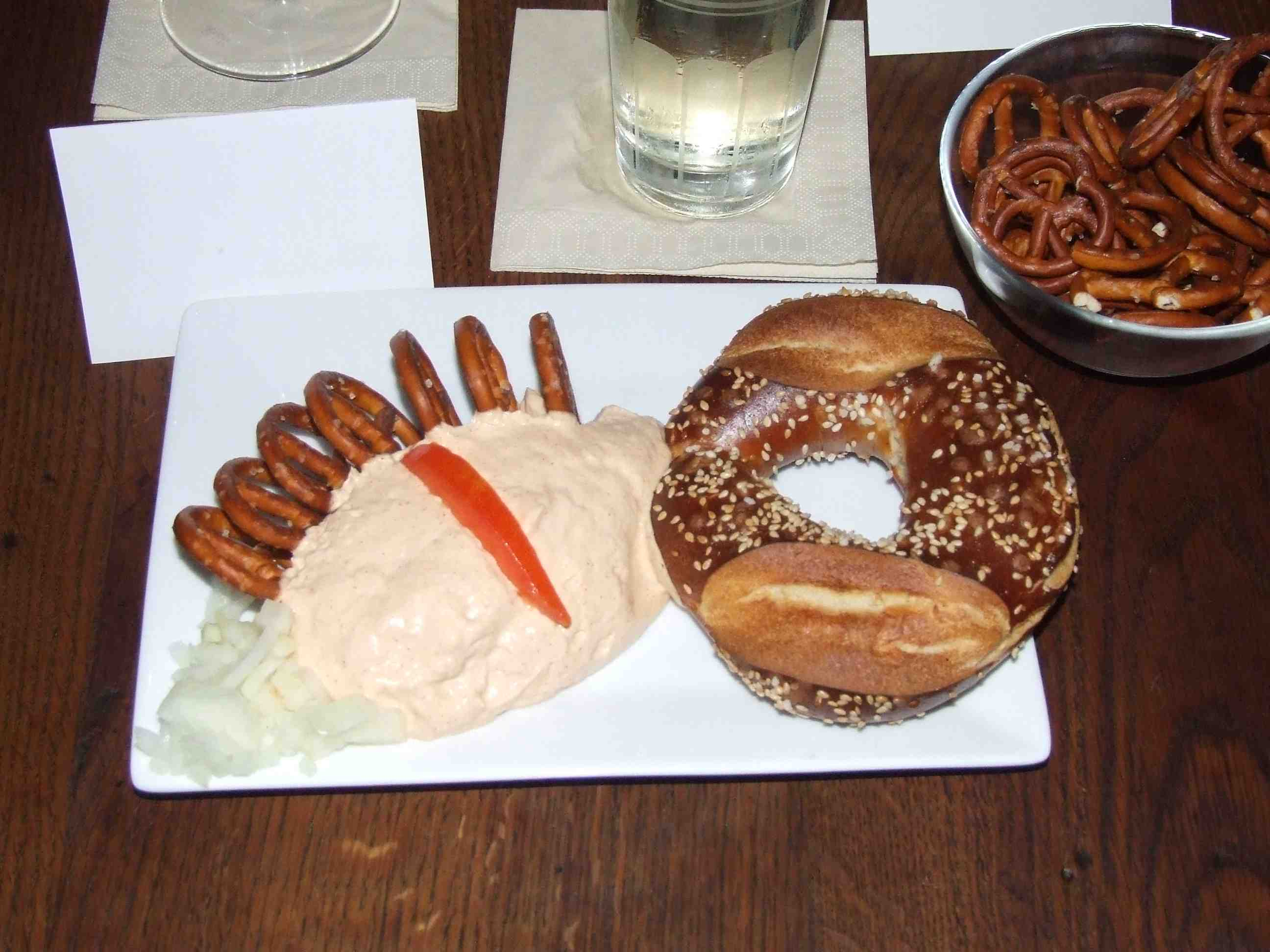 eine Portion Spundekäs mit einer etwas ungewöhnlichen Laugenbrezel, sowie kleine Salzbrezeln, in einem Mainzer Weinlokal